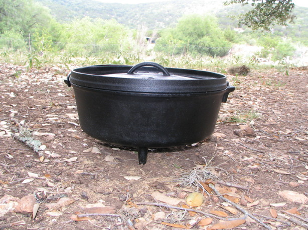 12"/6 qt Dutch Oven